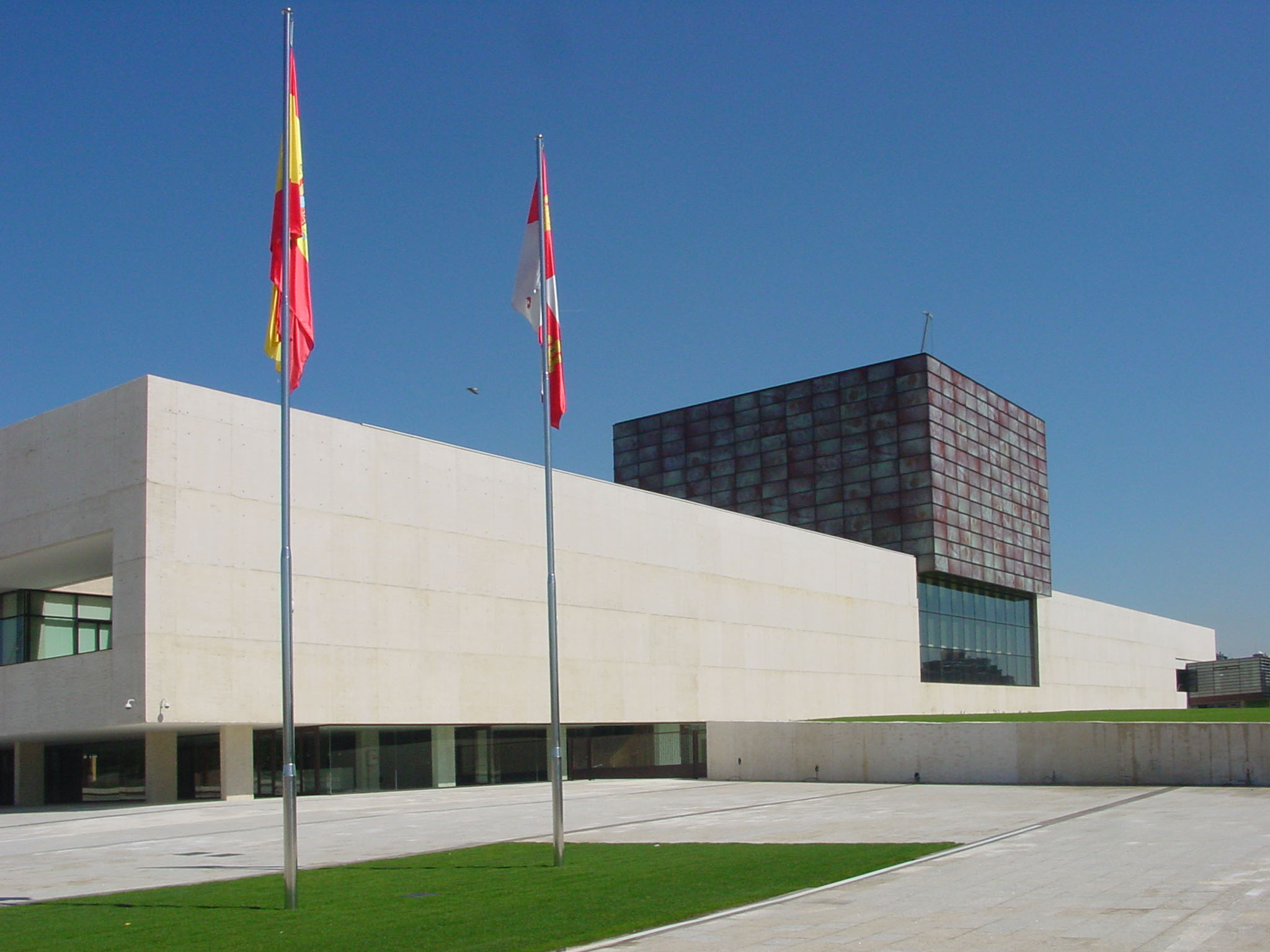 Valladolid. Edificio nuevo de las Cortes de Castilla y León inaugurado en junio de 2007.